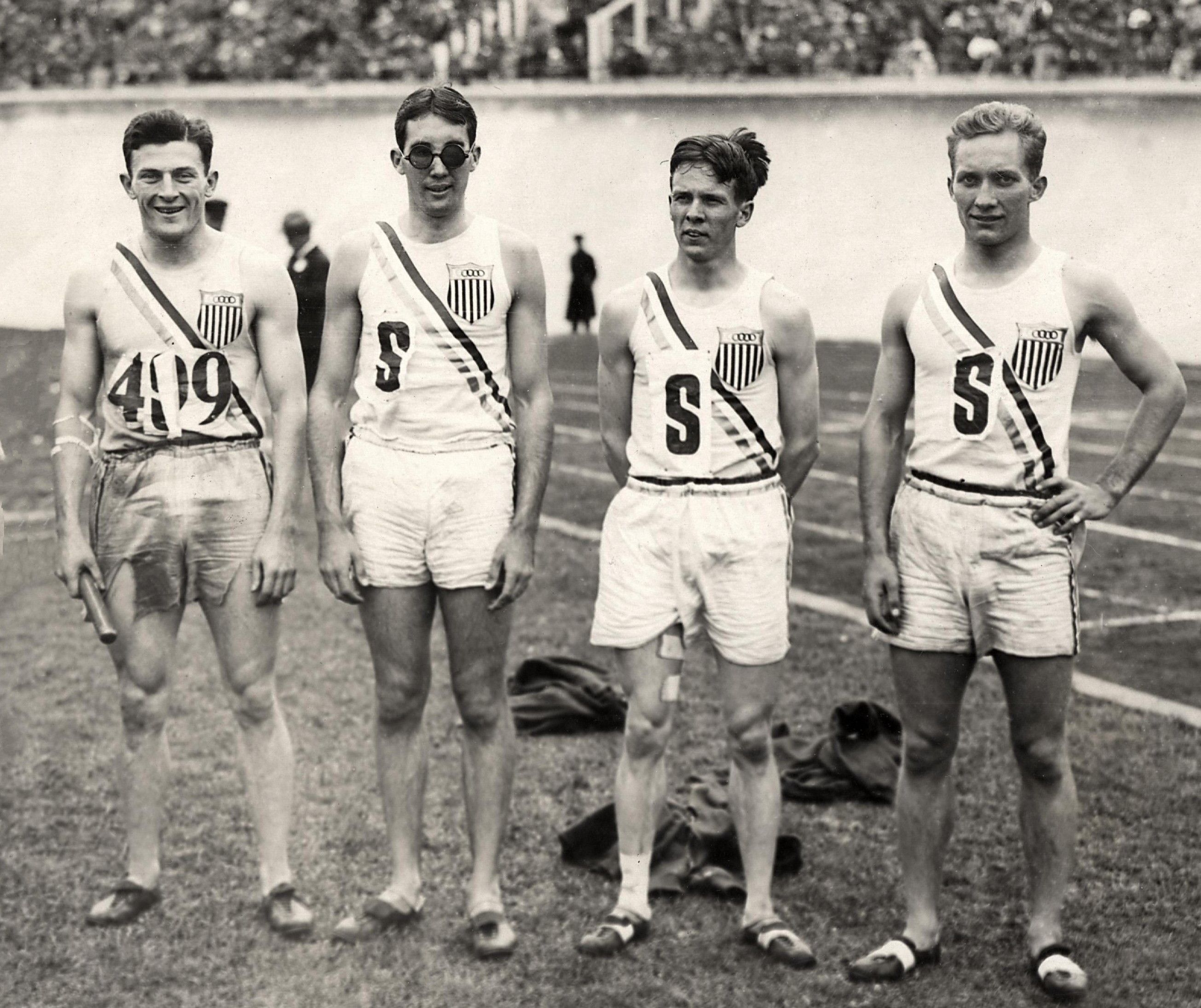 Sport. Olympische Spelen 1928 Amsterdam, Nederland : Het Amerikaanse team voor de 4x400 m estafette, dat olympisch kampioen zou worden. Vlnr Barbuti, Spencer, Alderman en Baird